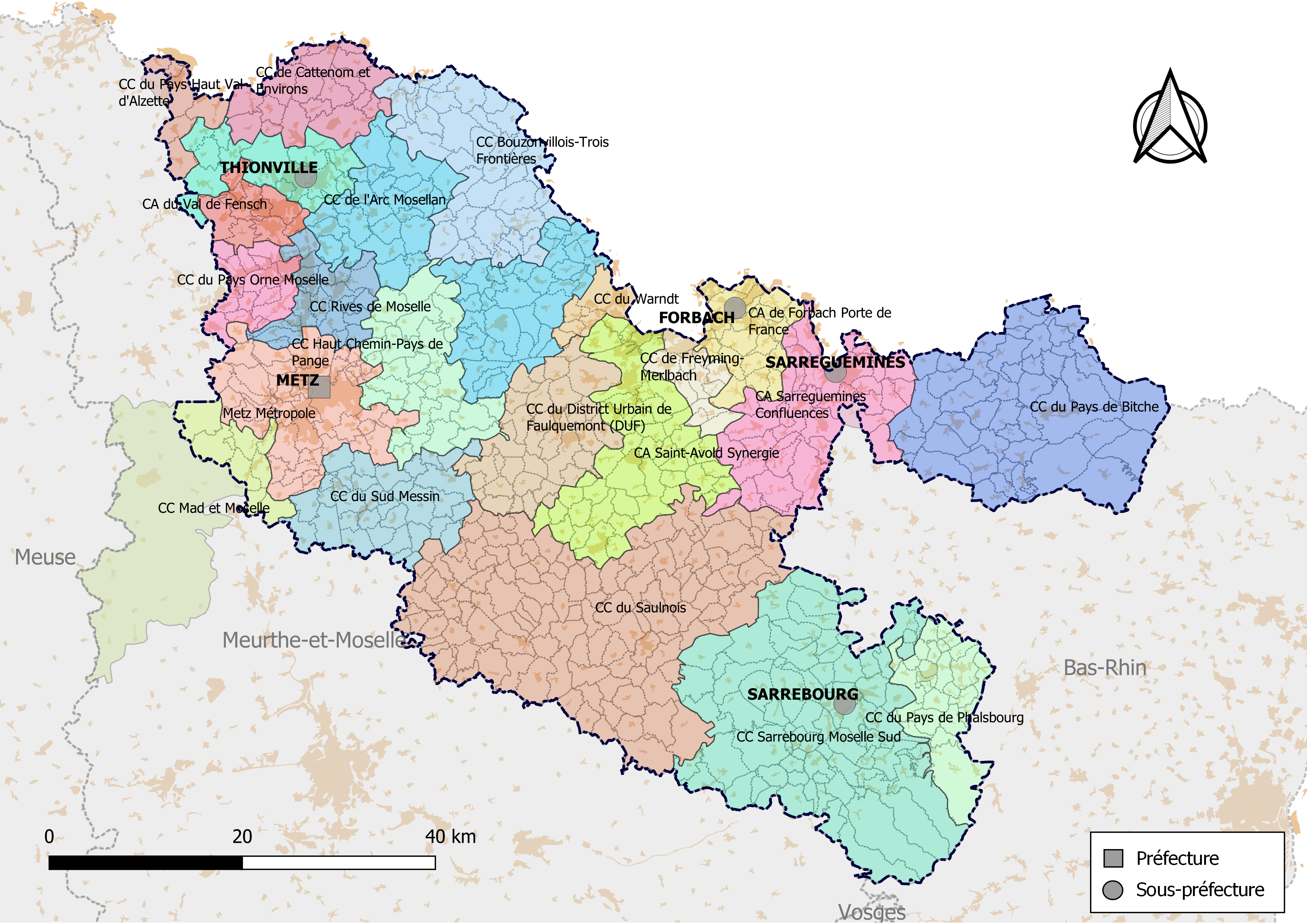 Carte des intercommunalités du département de la Moselle, France. Composition au 1er janvier 2019.